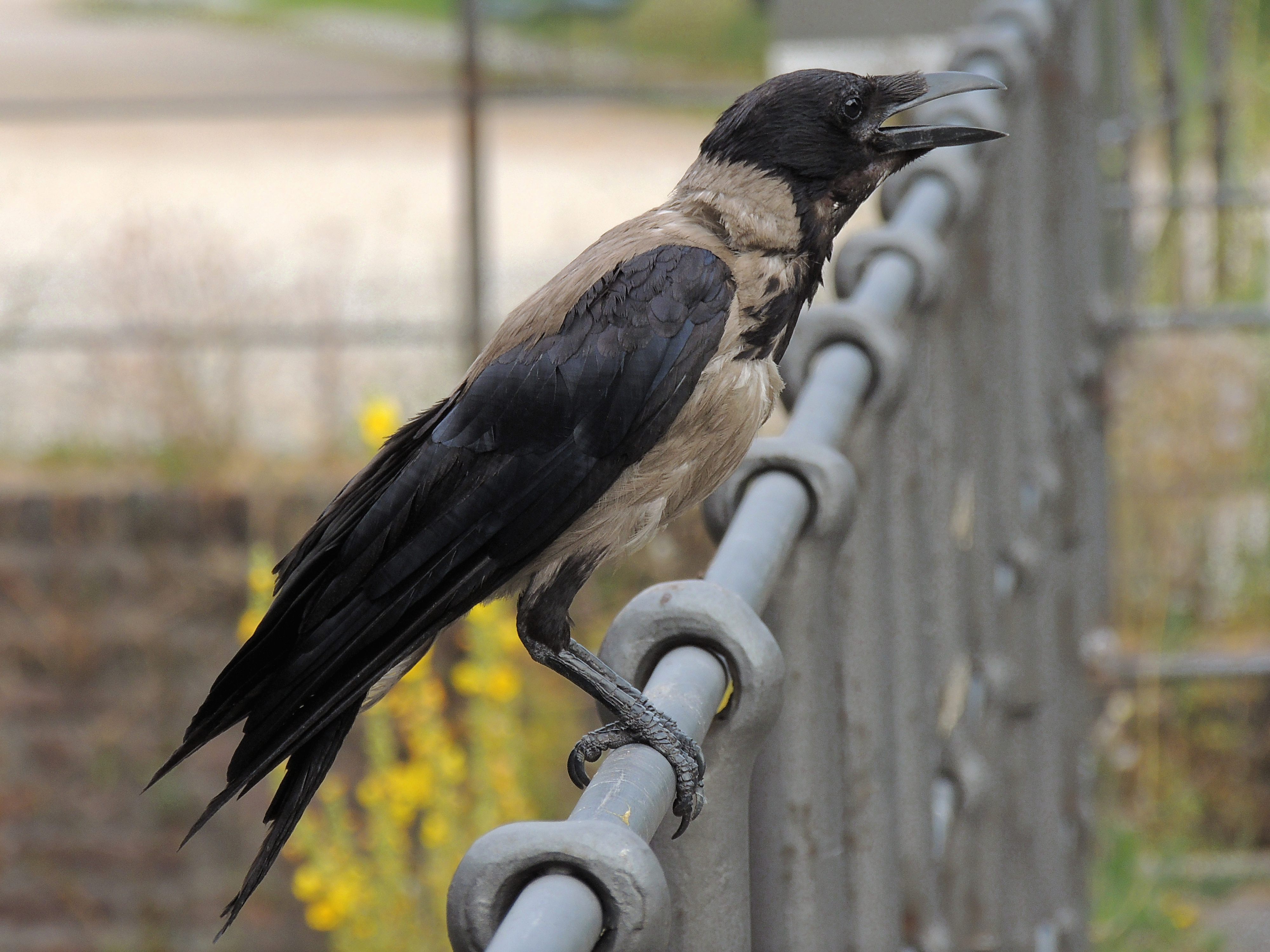 hooded crow Nebelkrähe cioară grivă